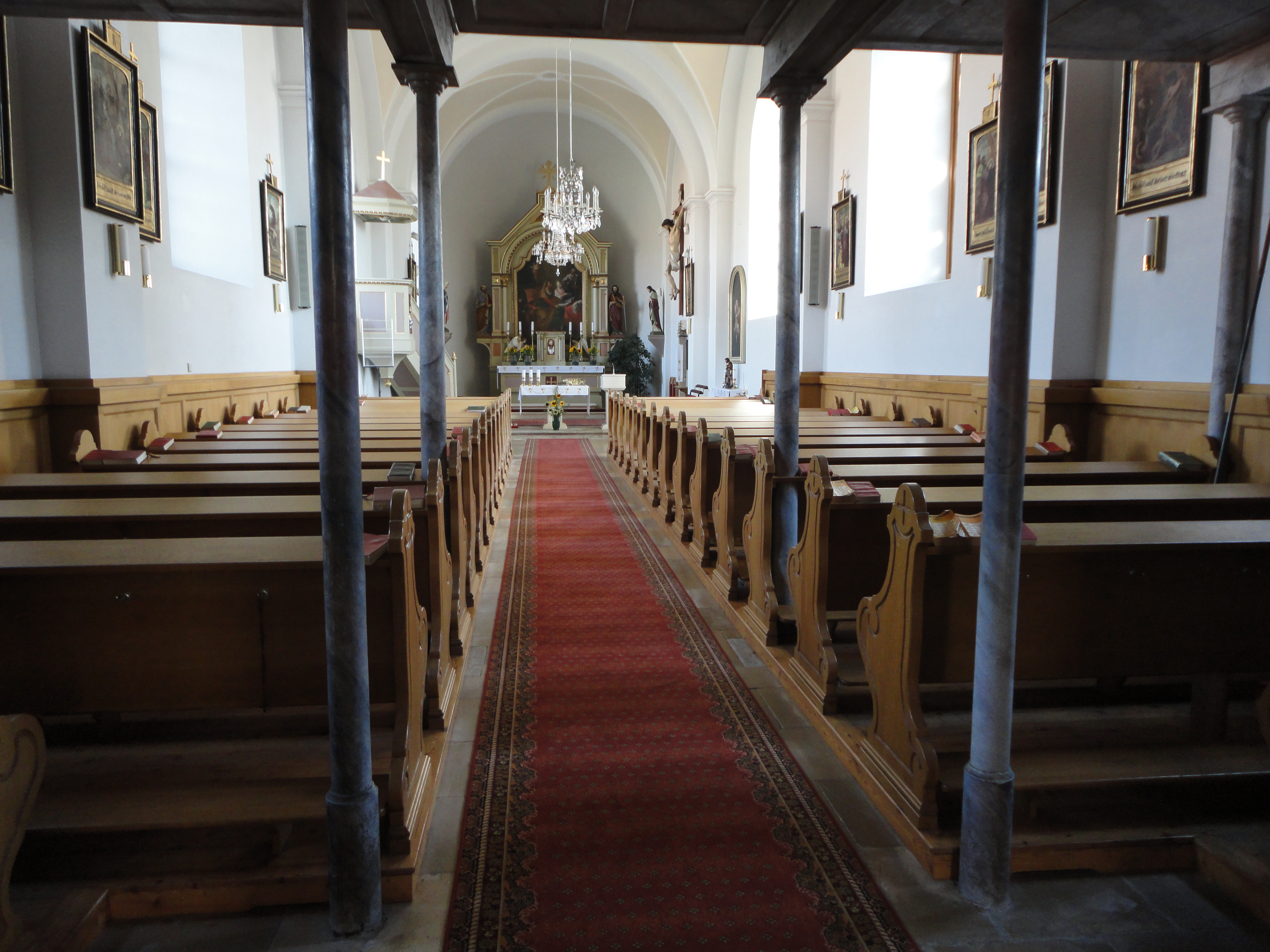 Kath. Pfarrkirche hl. Anna